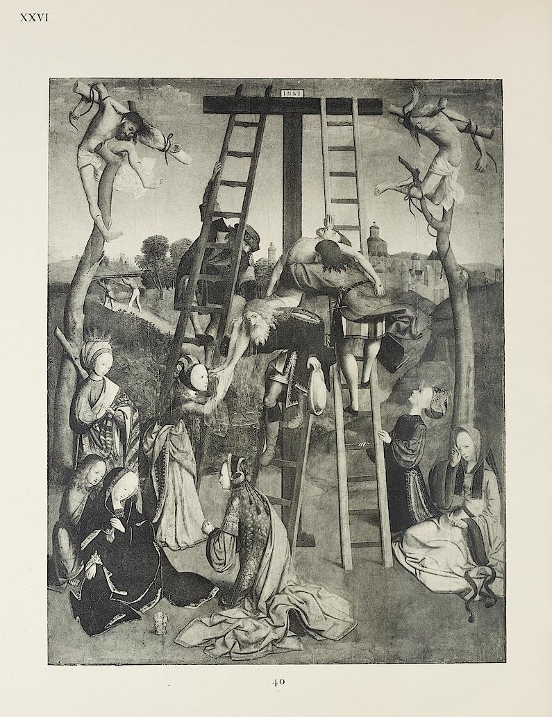 Descente de croix Figdor : photo en noir et blanc du catalogue de la vente aux enchères